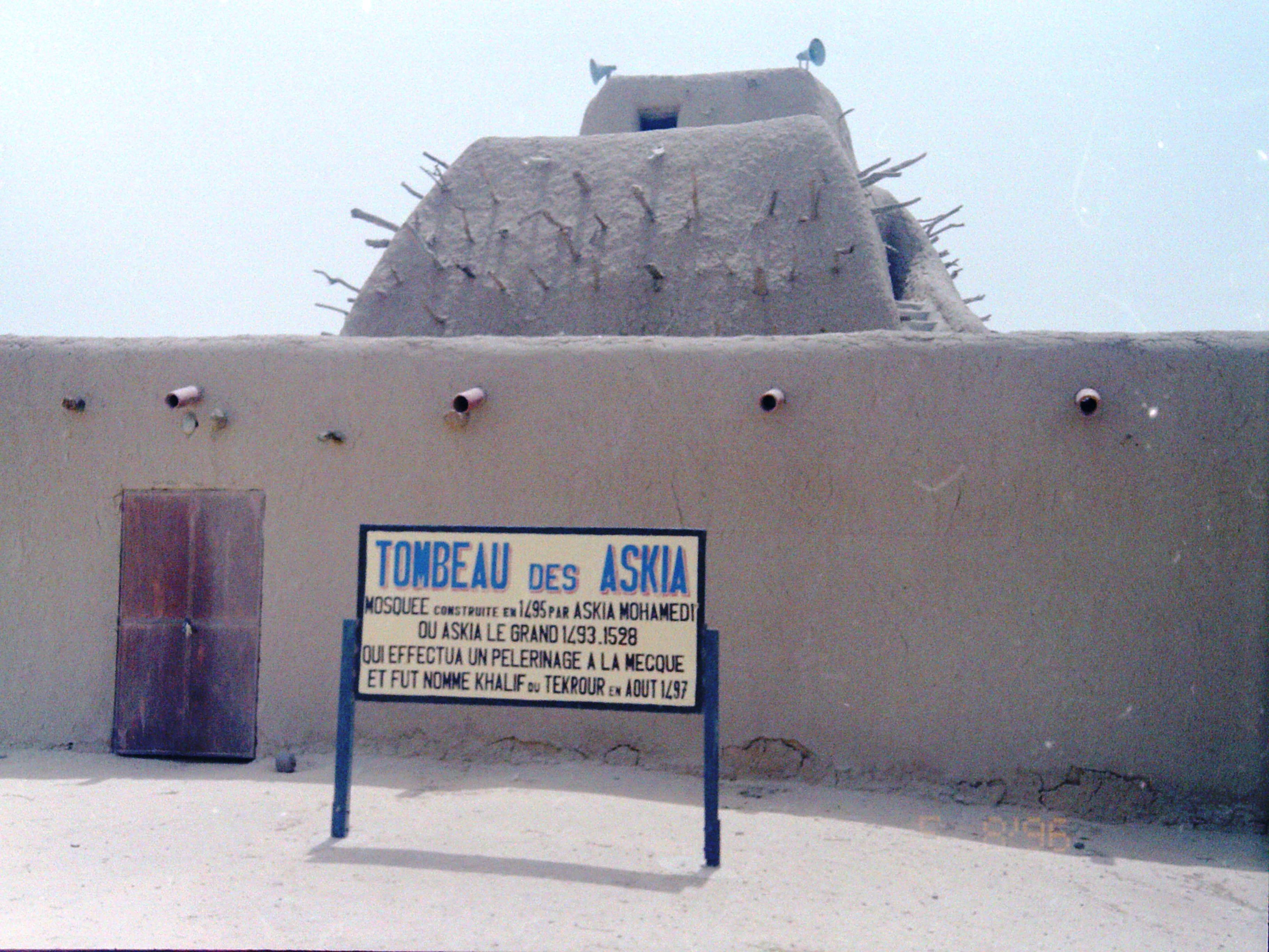 un tombeau d'un Kajif du 1400